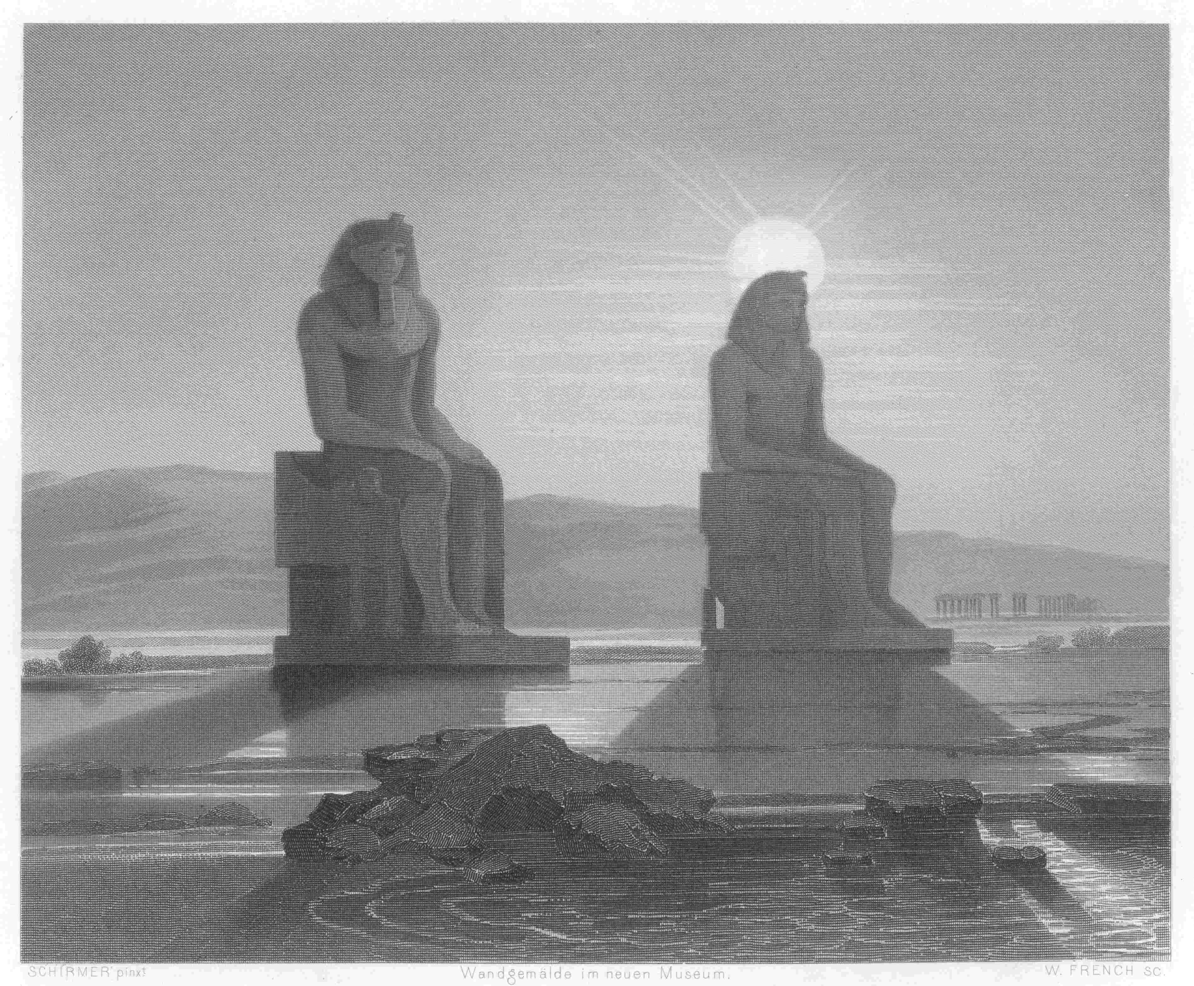 Memnon Kolosları